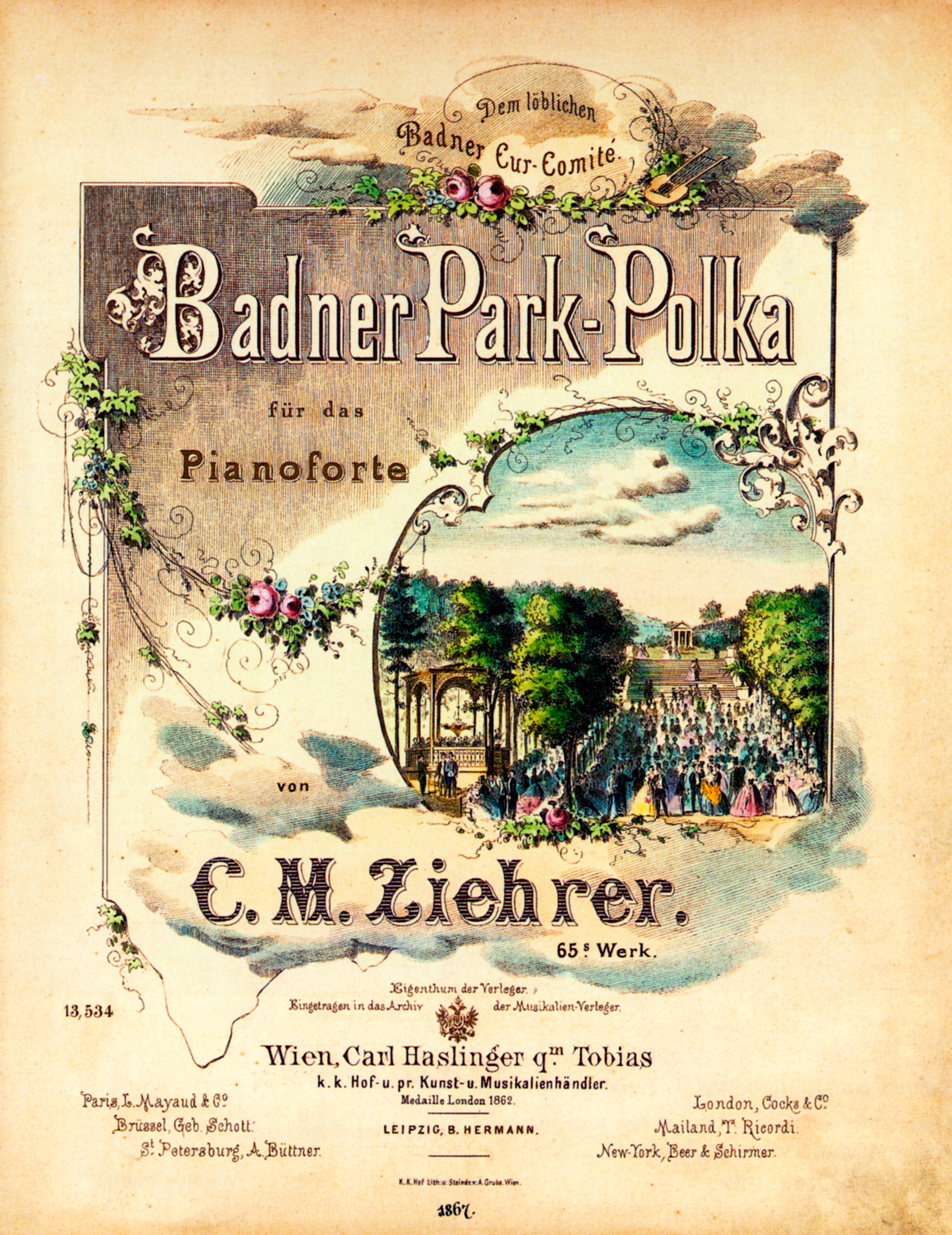 Carl Michael Ziehrer, Badner Park-Polka, Titelblatt der Klaviernoten, opus 65 (1867)